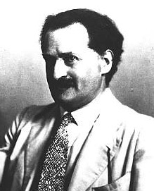 Emil Lederer (1882-1939), český, německý a americký ekonom a sociolog